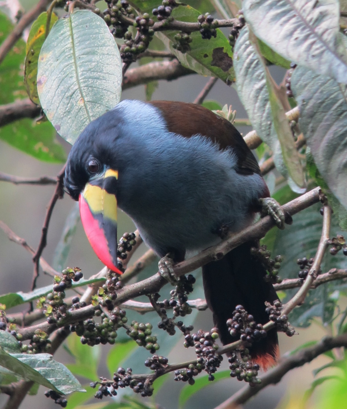 Manizales, Caldas, Colombia